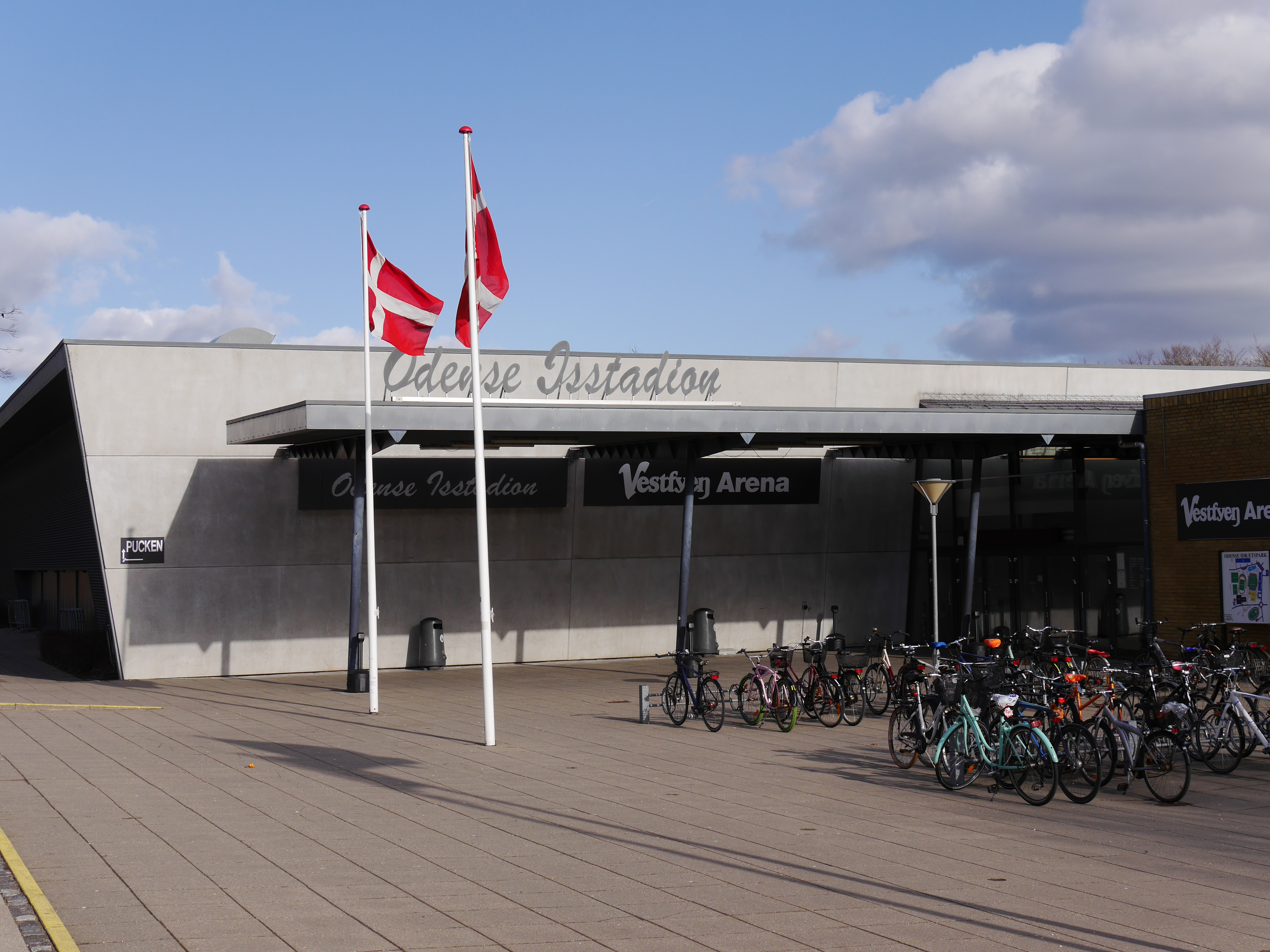 Bryggeriet Vestfyen Arena, Odense